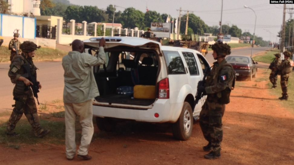 Les soldats français à Bangui, République Centrafricaine. Décembre 22, 2013